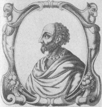 Jean Antoine de Baïf, French poet